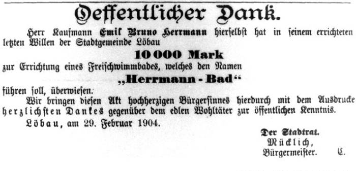 Öffentlicher Dank der Stadt Löbau für die Spende von 10.000 Mark durch Emil Bruno Herrmann für das Herrmannbad